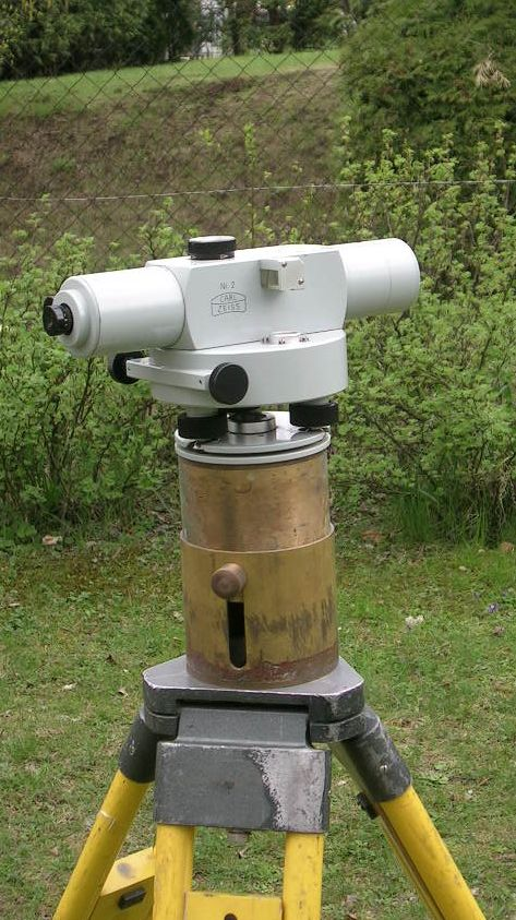 Zeiss Ni2, automatisches Nivellierinstrument (konstruiert um 1950, gebaut bis ca. 1985) Die "Verlängerung" des Stativs diente einer Spezialvermessung fotogr. April 2006, Geof